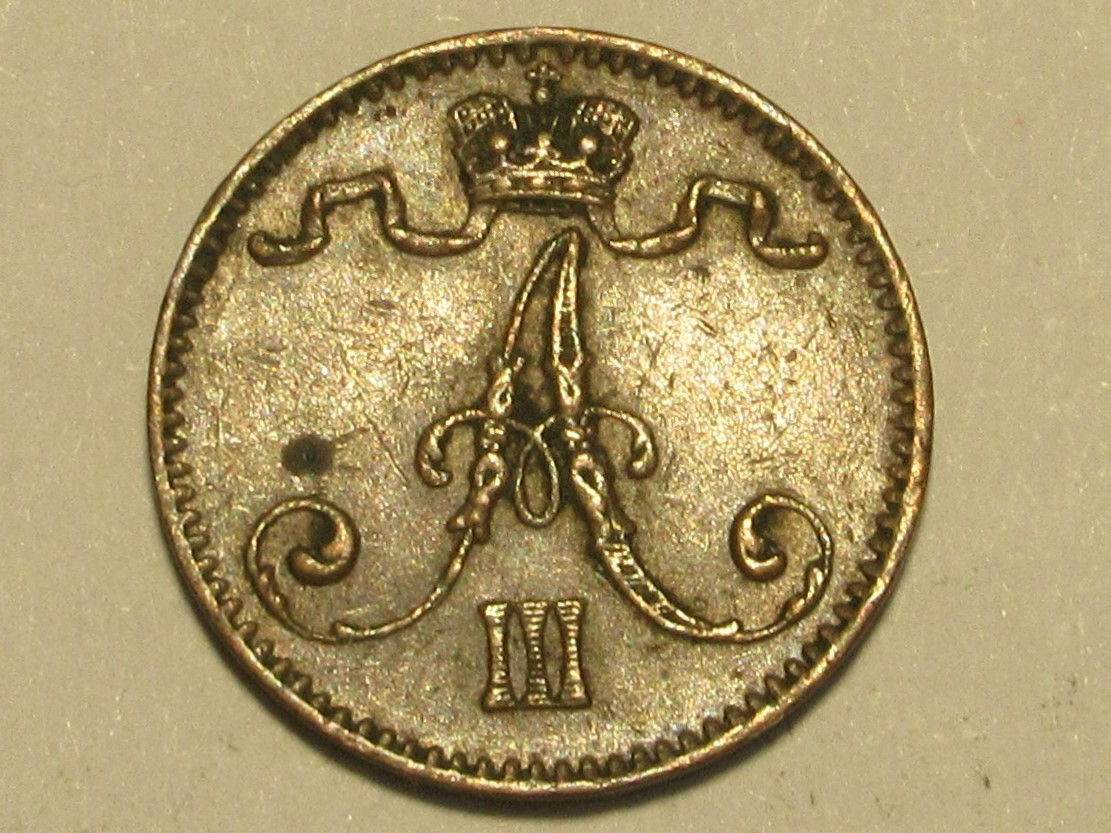 Rückseite des Penni, Monogramm Zar Alexanders III., Schön/Cartier Weltmünzkatalog Nr. 12